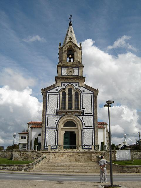 Igreja em Vila Verde, Portugal.